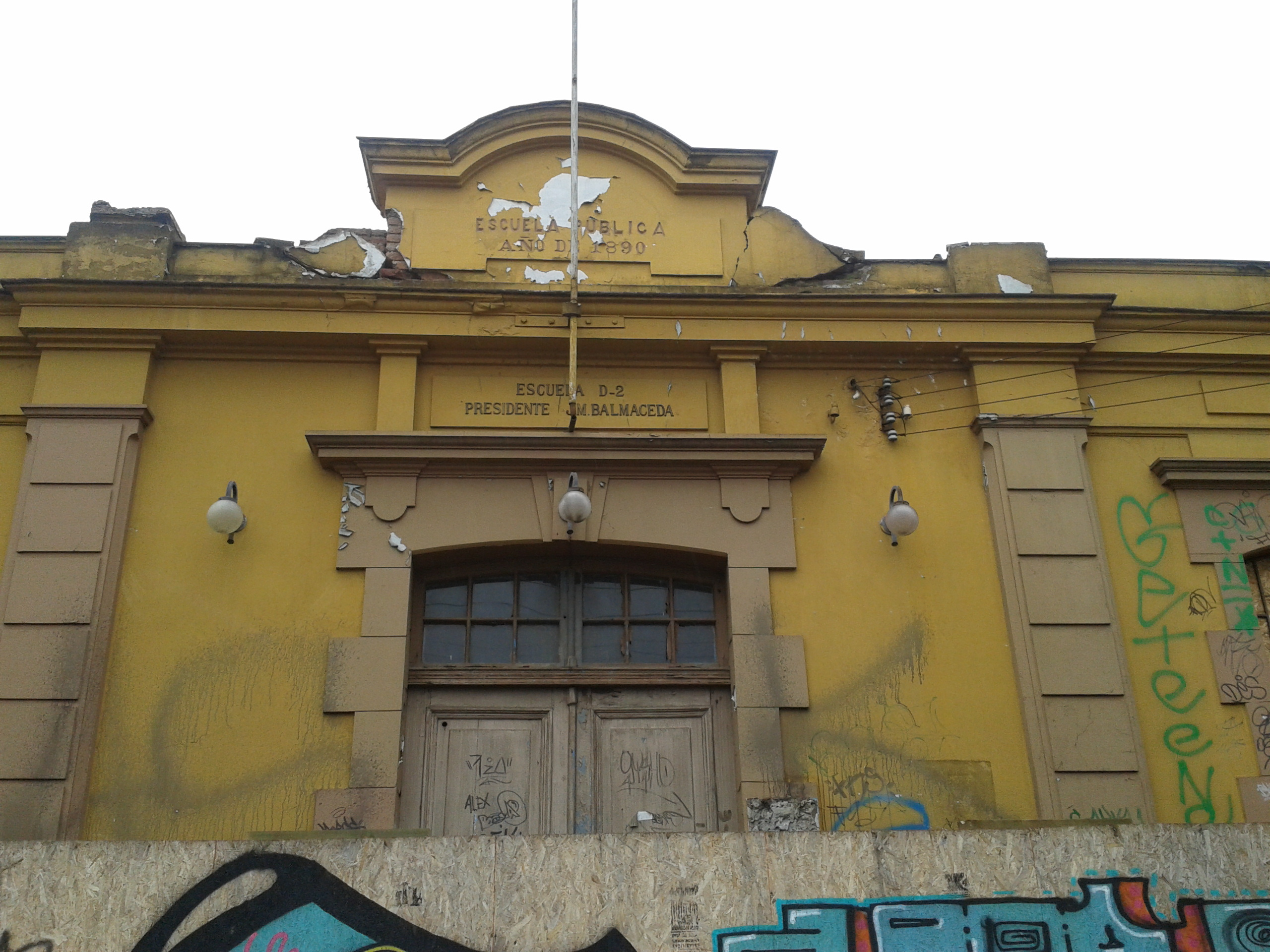 Escuela D-2 Presidente José Manuel Balmaceda This is a photo of a national monument in Chile: 1856